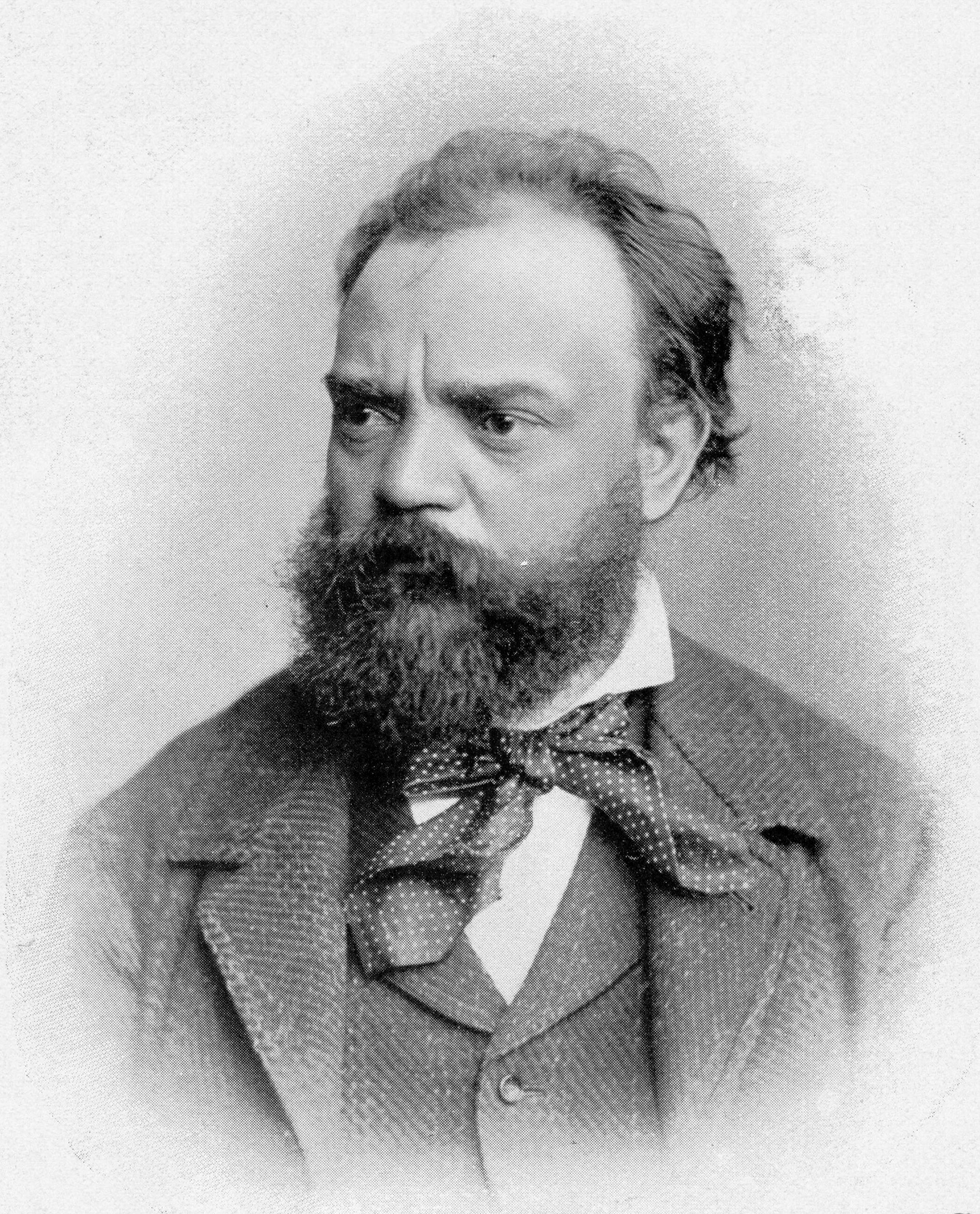 Depicted person: Antonín Dvořák